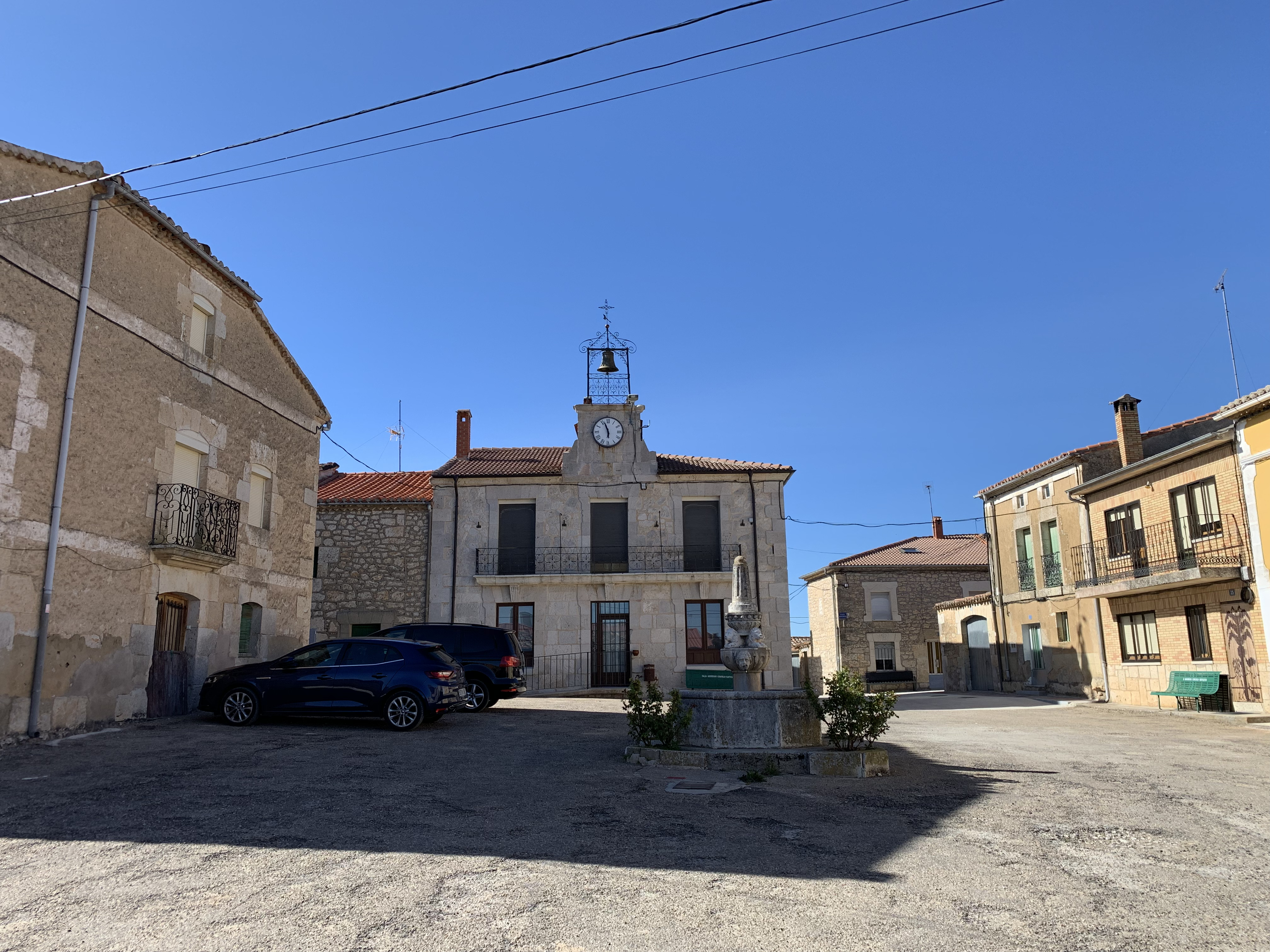 Ayuntamiento, Cilleruelo de Arriba